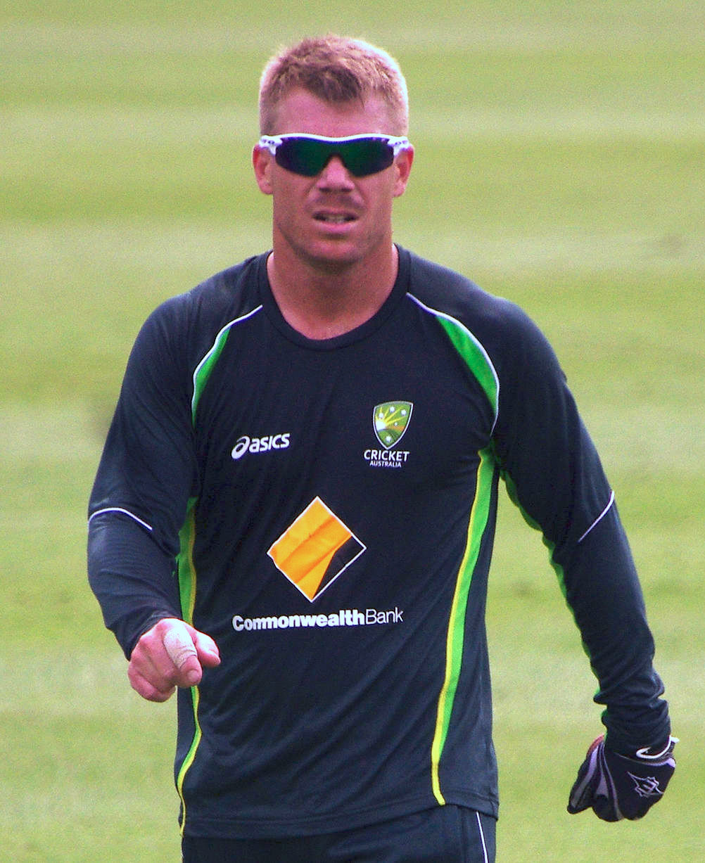 DAVID WARNER